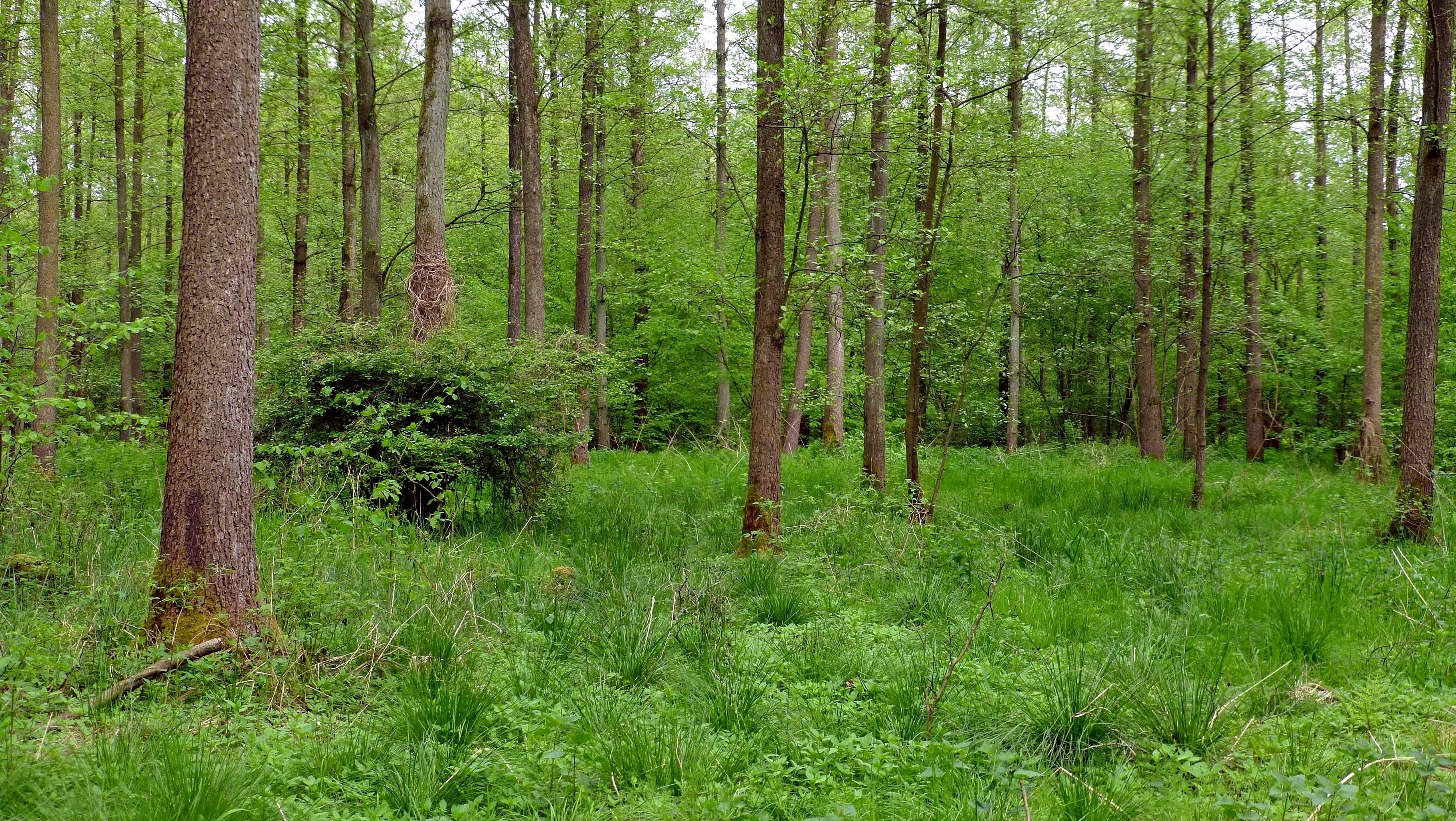 Im südöstlichen Bereich durchfließt die Alte Thöse das Naturschutzgebiet. Die vorherrschende Baumart ist hier die Erle. Auch ein blühender Weißdorn-Strauch, umrankt von Hopfen, ist zu sehen. Das Naturschutzgebiet ist fast deckungsgleich mit dem FFH-Gebiet Brand (3426-301).